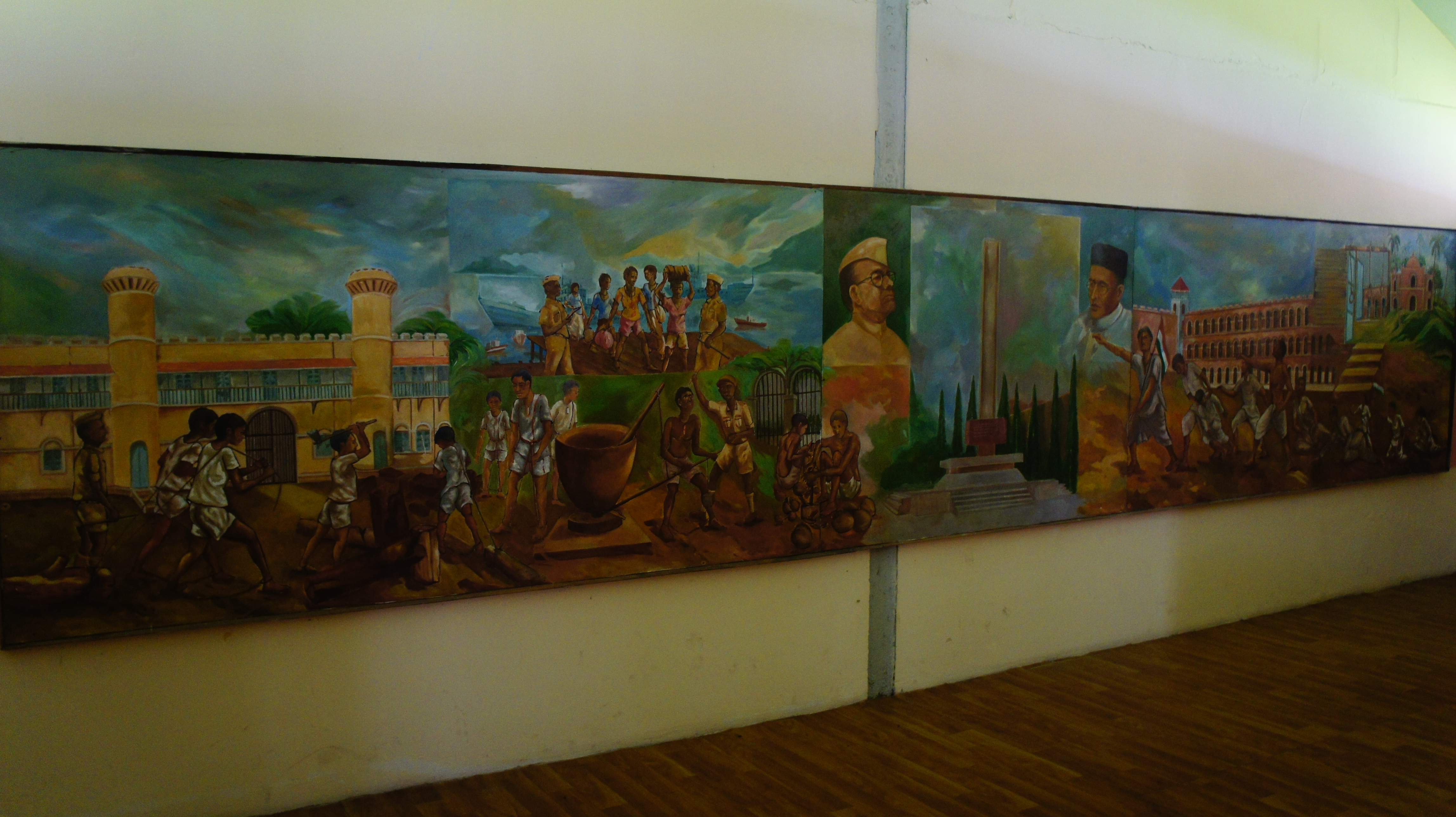 Панорама с заключенными в национальном мемориале Сотовая тюрьма в Индии Порт-Блэр Cellular Jail